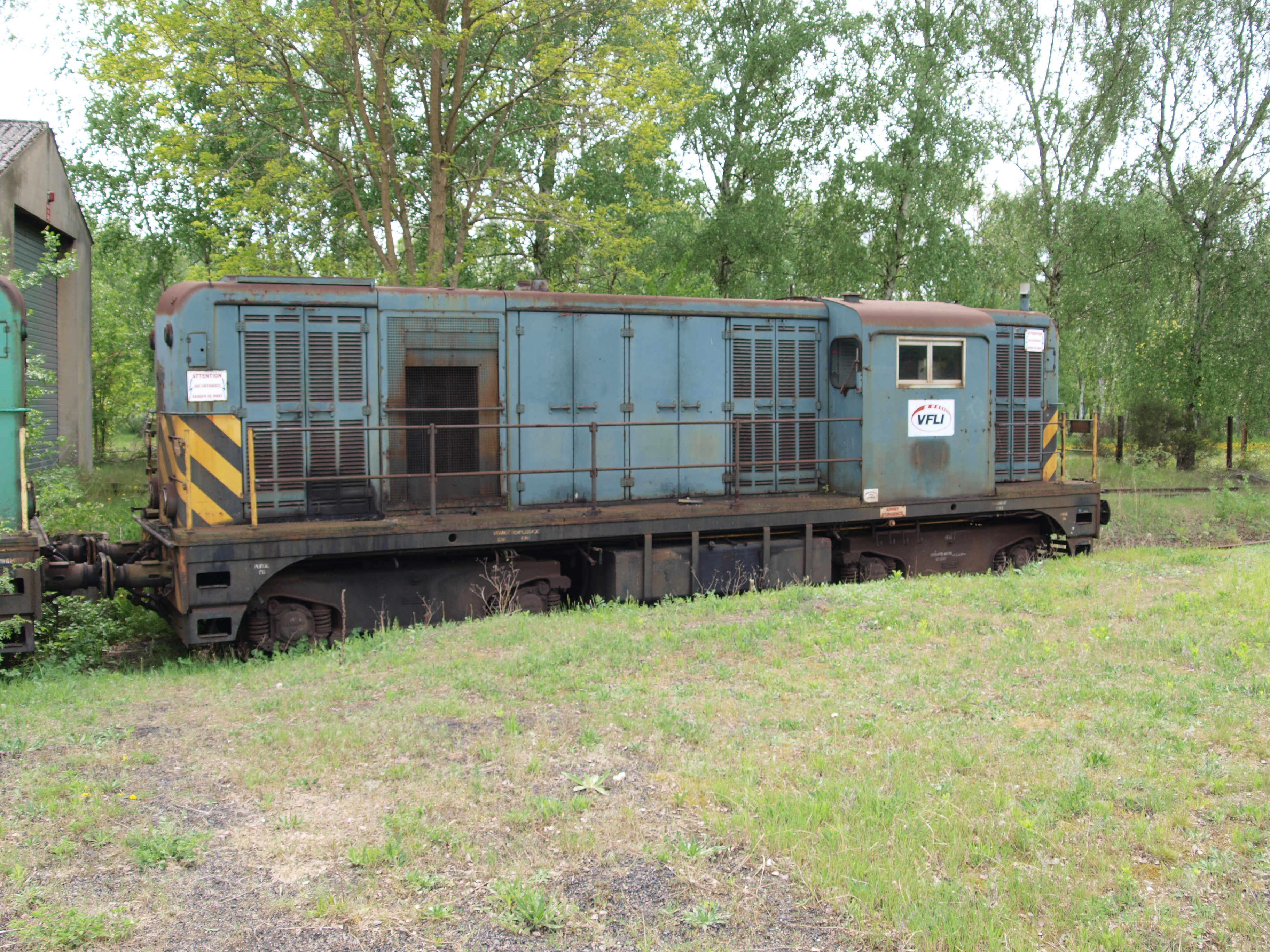 VFLI Cargo diesel locomotive at Petite-Rosselle